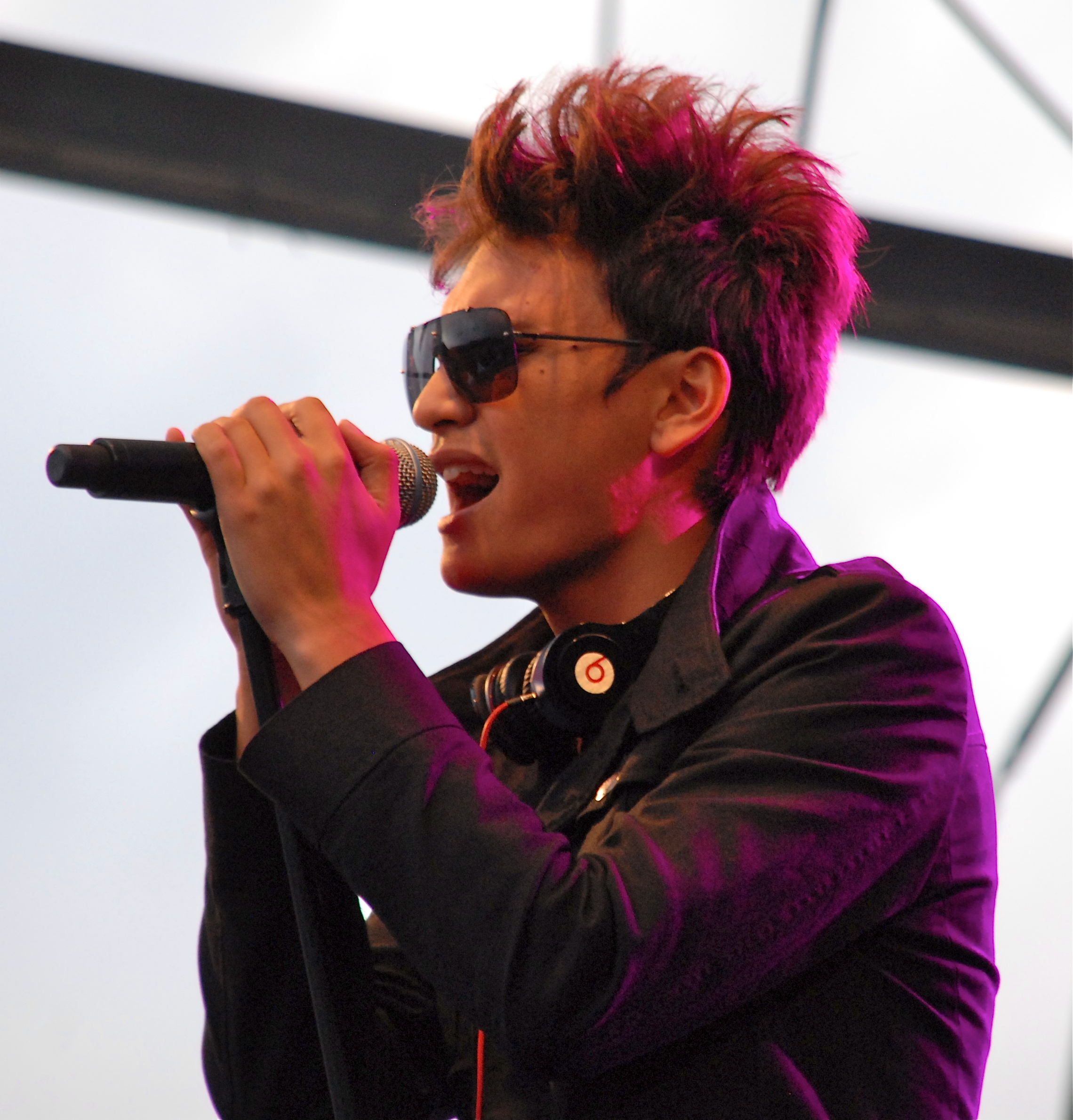 RnB-artisten Newkid på Ung08-festivalen i Kungsträdgården i Stockholm 20 augusti 2011.